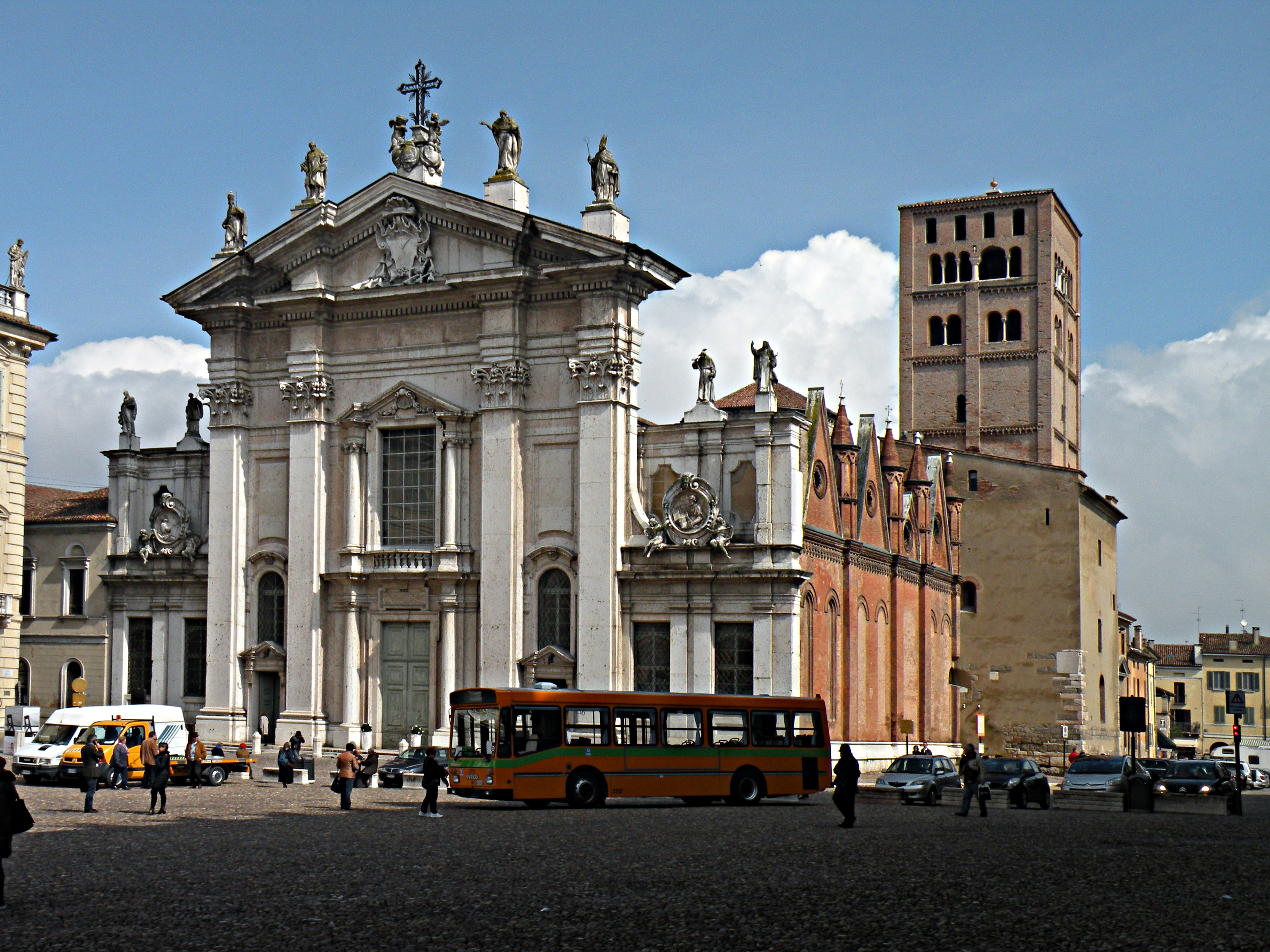 Базилика Св.Петра в Мантуе